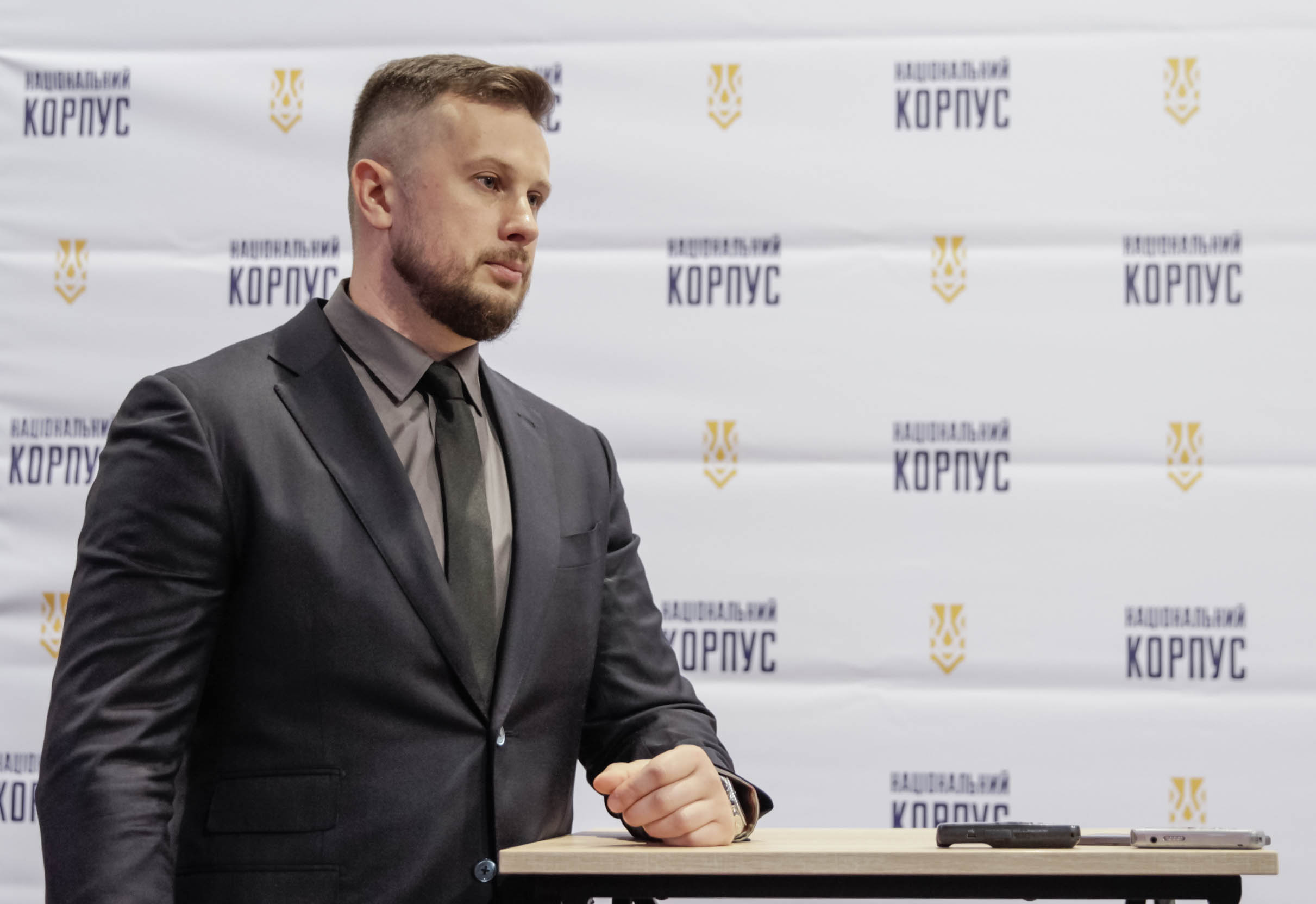 Андрій Білецький на другому з'їзді партії Національний Корпус 14.10.2017